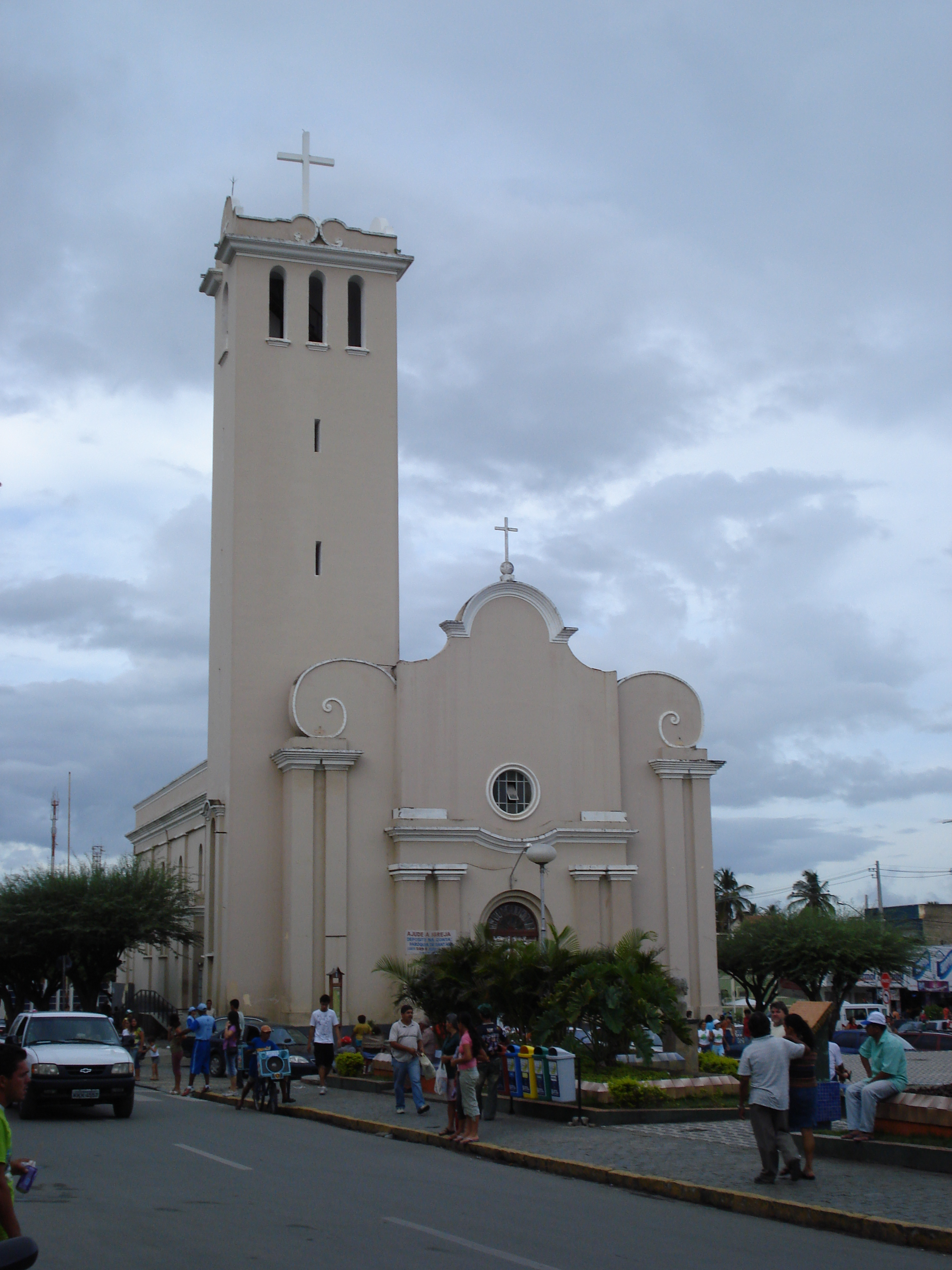 Igreja Matriz de Sant'Ana, church in Gravatá, Pernambuco, Brazil